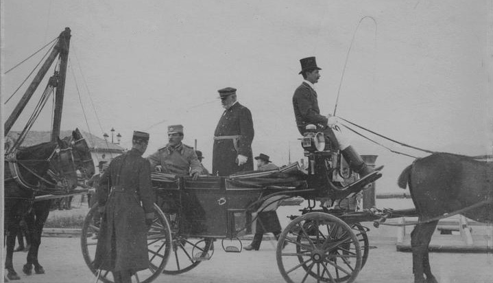 6 fév 1916 présentation de l'amiral Paul de Gueydon du prince Alexandre de Serbie à Corfou .